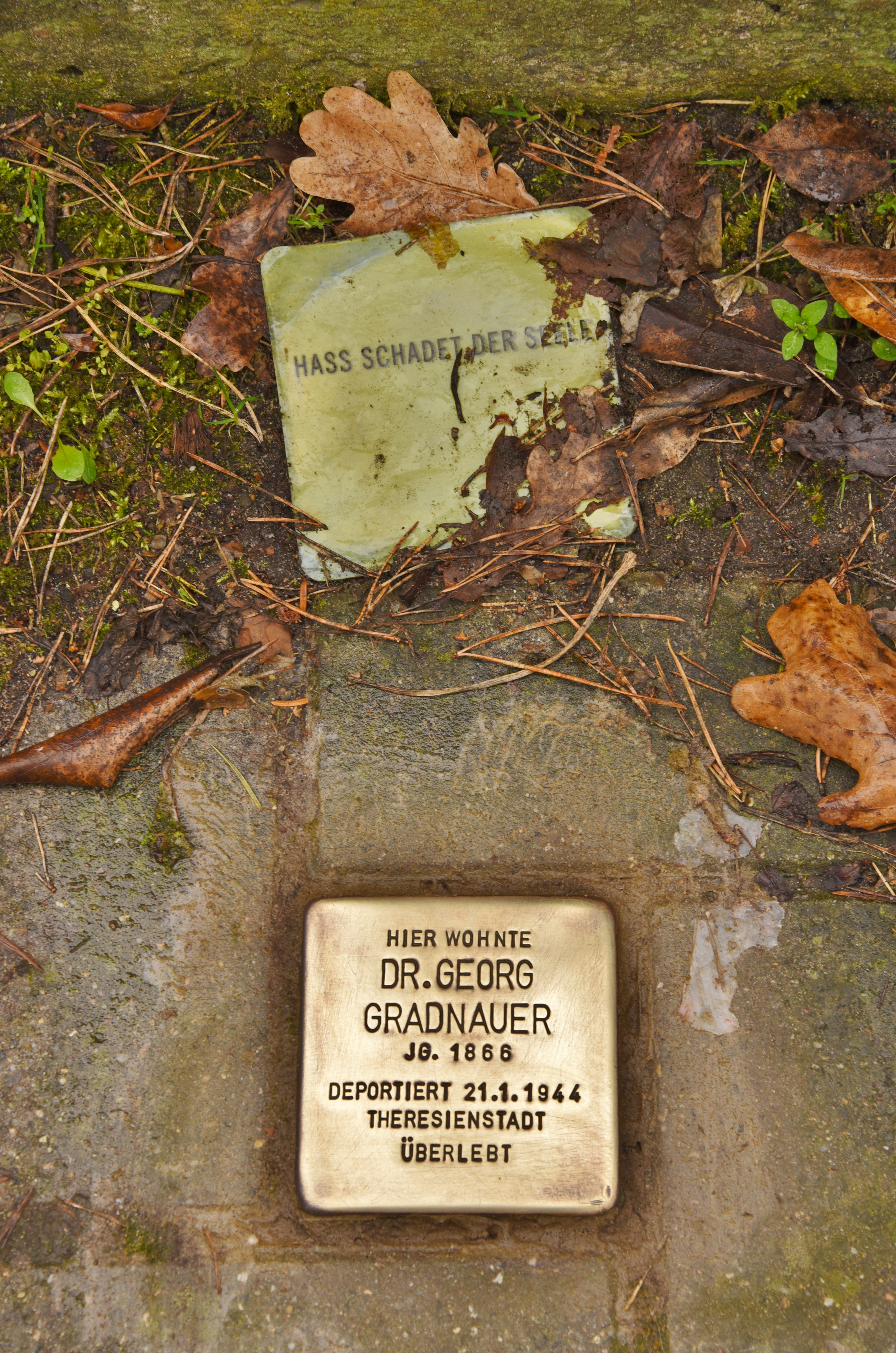 Stolperstein für Dr. Georg Gradnauer - Hass schadet der Seele